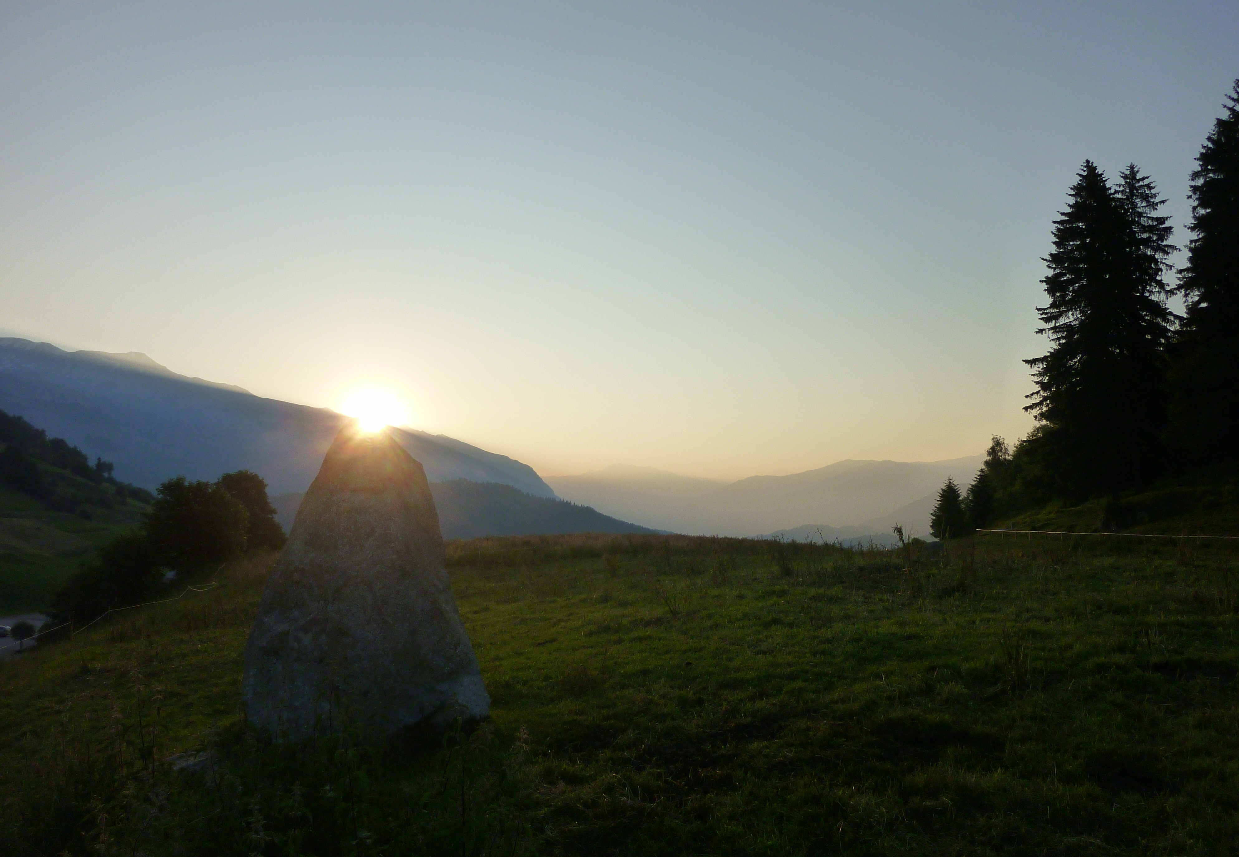 Sonnenaufgang über Menhir im Parc la Mutta in Falera GR